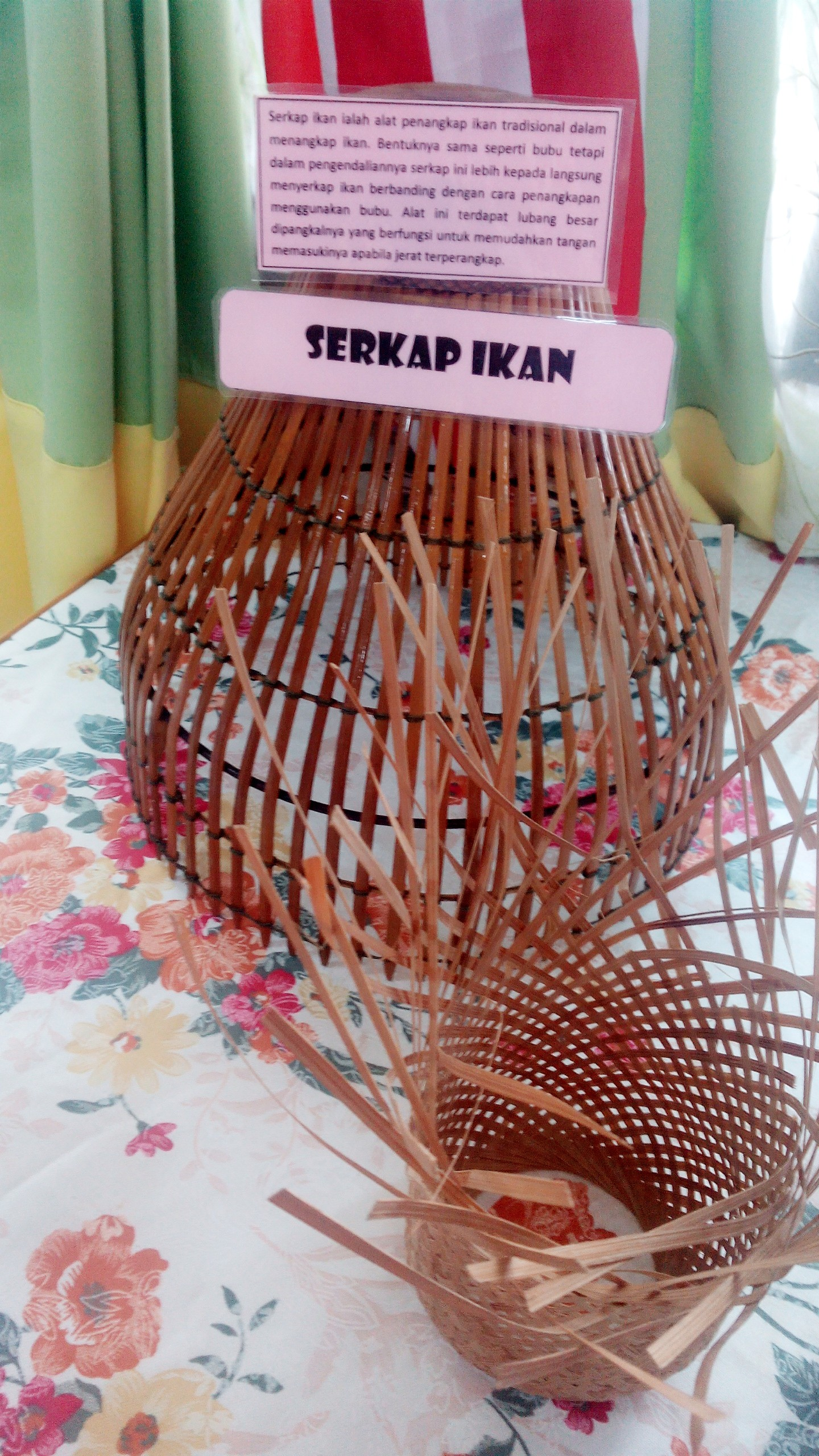 serkap ikan